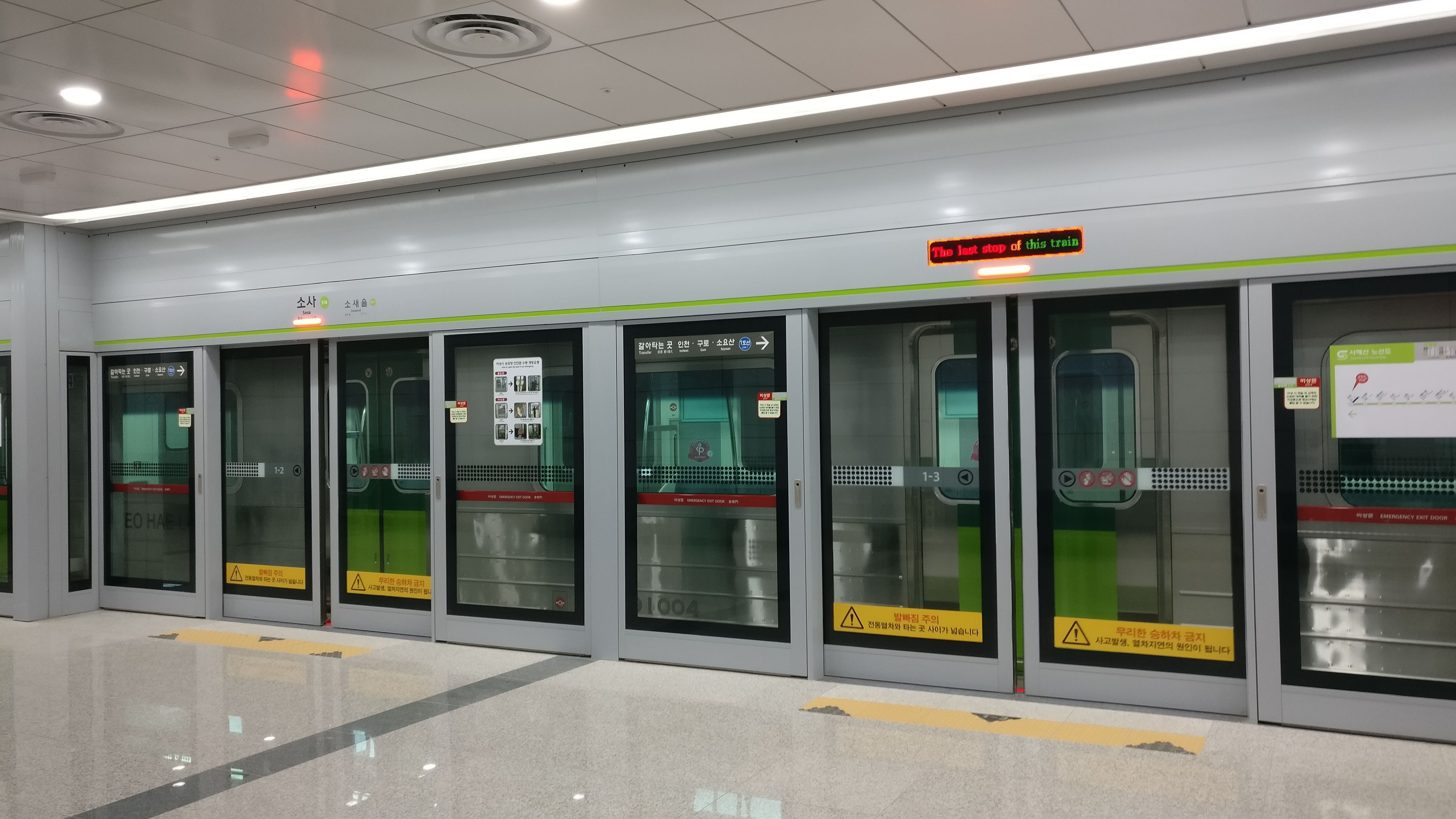 서해선 소사역 종점 승강장 사진